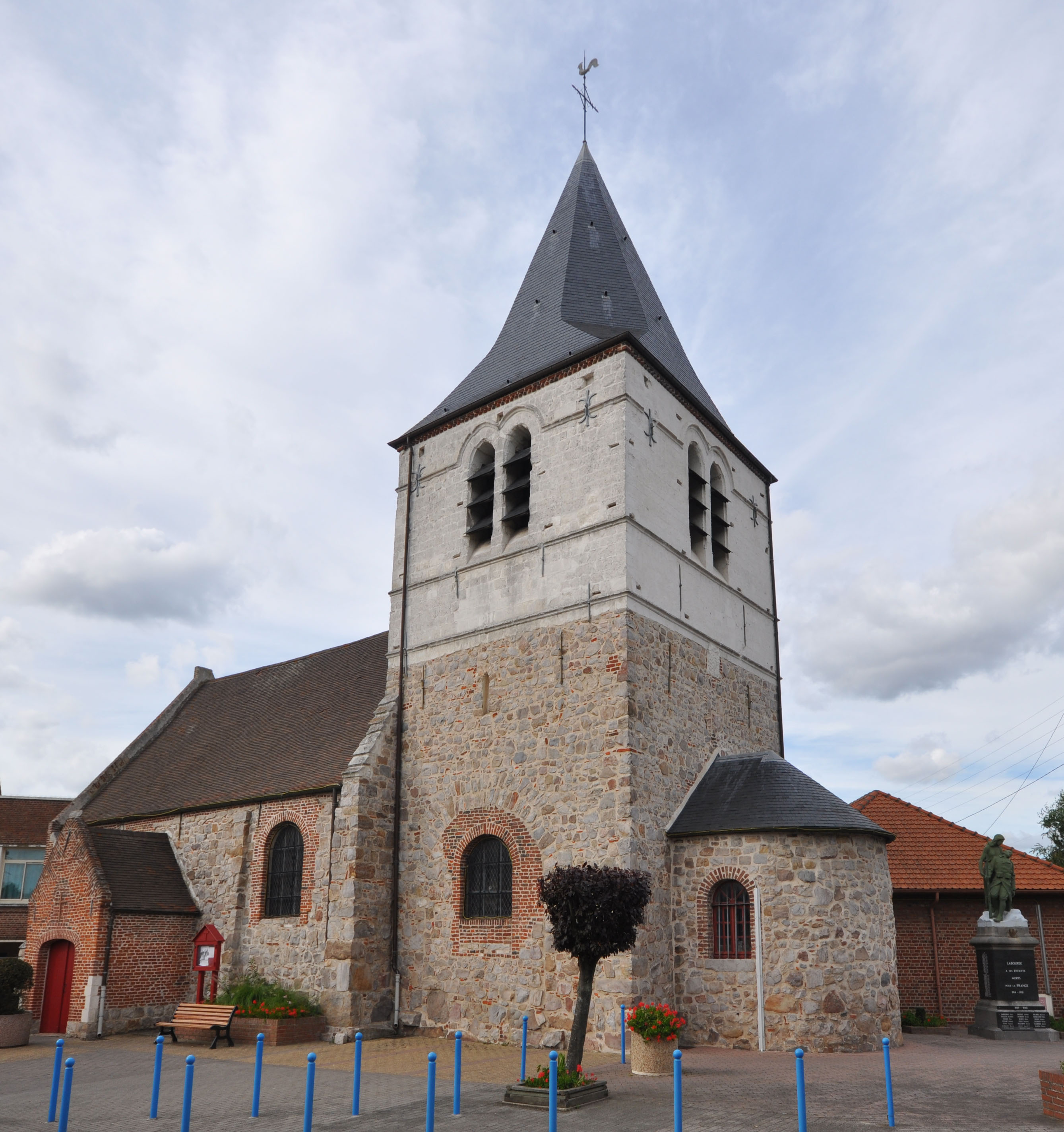 Église Saint-Martin de Labourse, (Inscrit, 1926) .